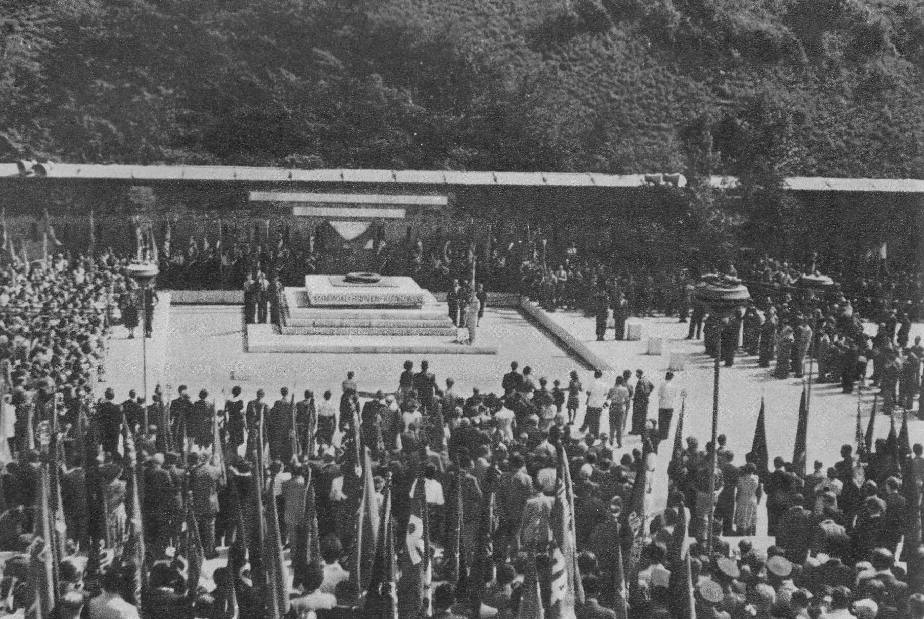 Odsłonięcie pomnika-mauzoleum Władysława Hibnera, Władysława Kniewskiego i Henryka Rutkowskiego na stokach Cytadeli w Warszawie